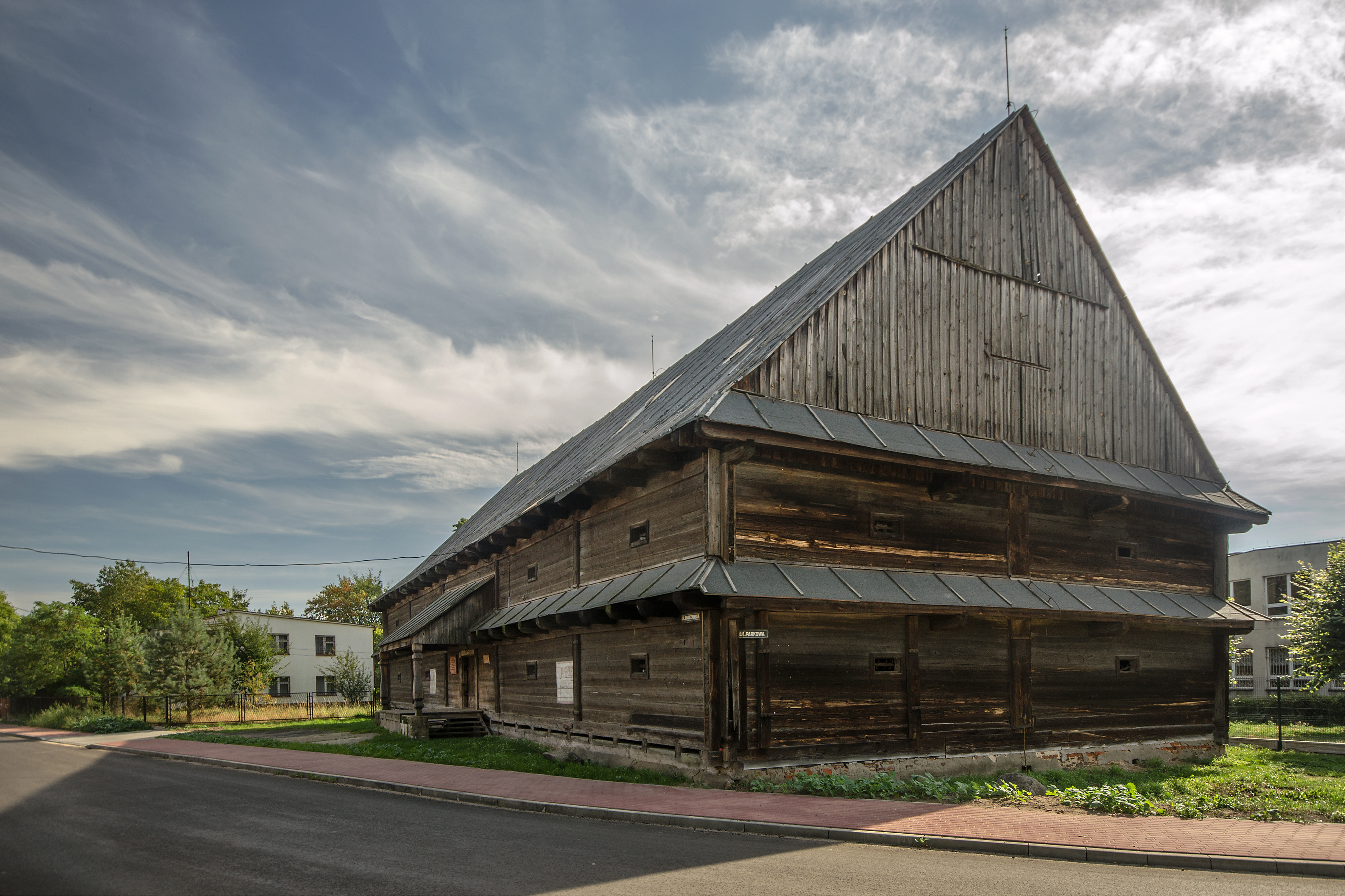 Skomlin, spichrz, 1777